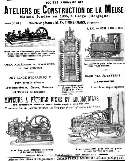 Advert for Ateliers de construction de La Meuse, of Liege, Belgium